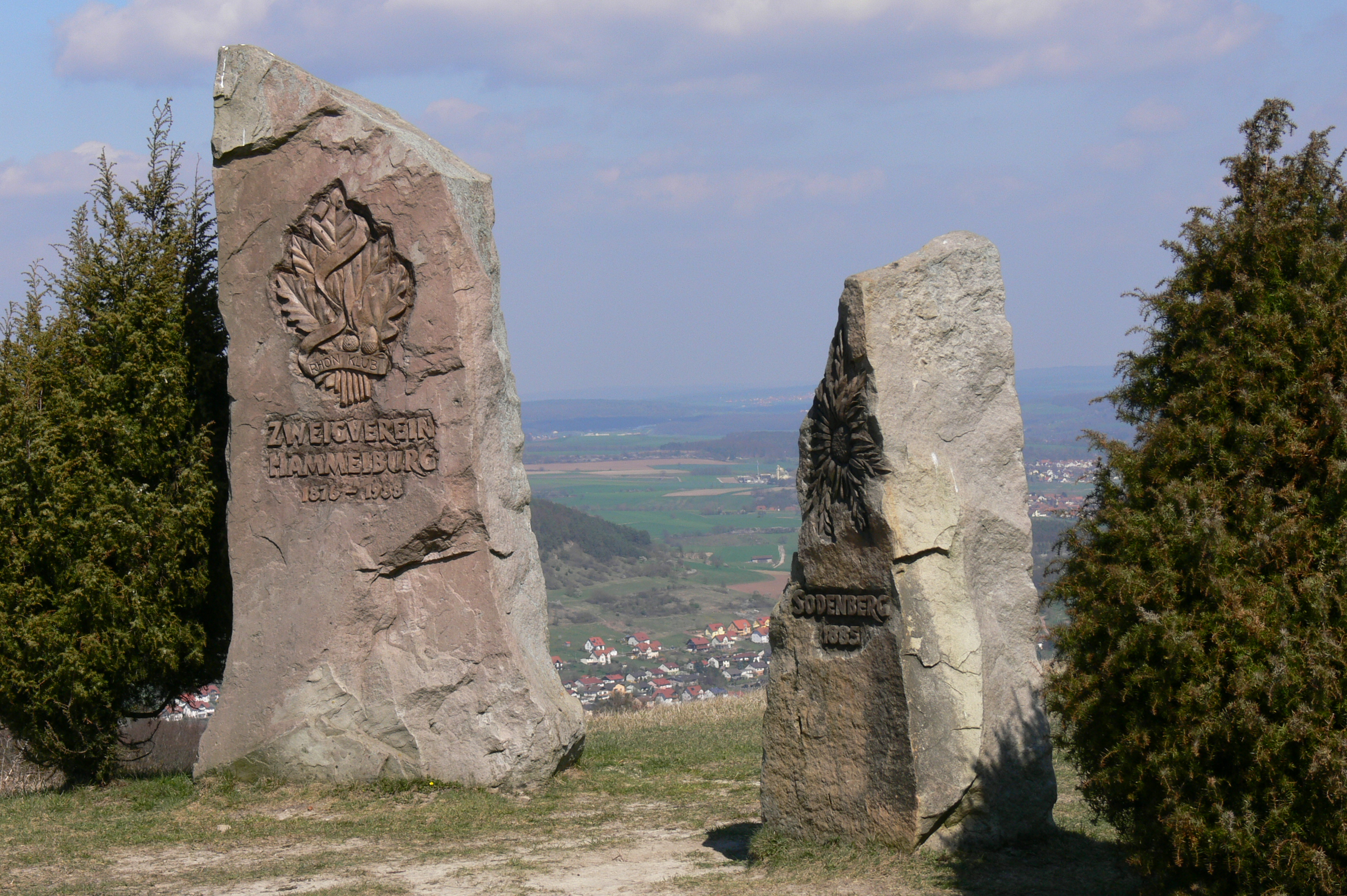 NSG Sodenberg-Gans - auf dem Gipfel; Gedenksteine „Rhön Klub Zweigverein Hammelburg 1876–1988“ und „Sodenberg 1885“